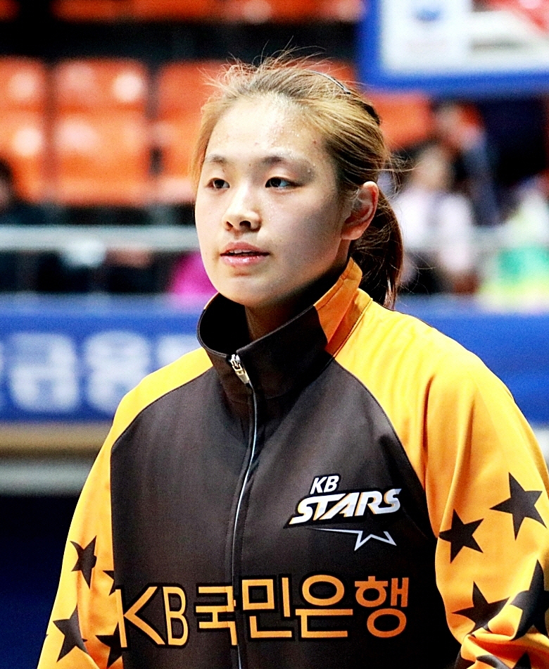 160217 여자농구 신한은행 vs KB스타즈 직찍 1